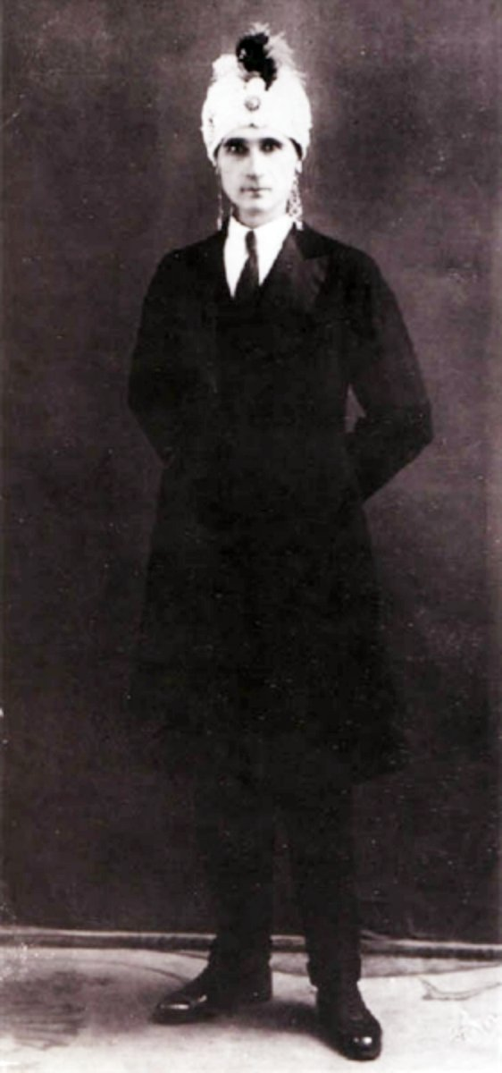 Российский гипнотизёр Николай Александрович Смирнов / Орнальдо